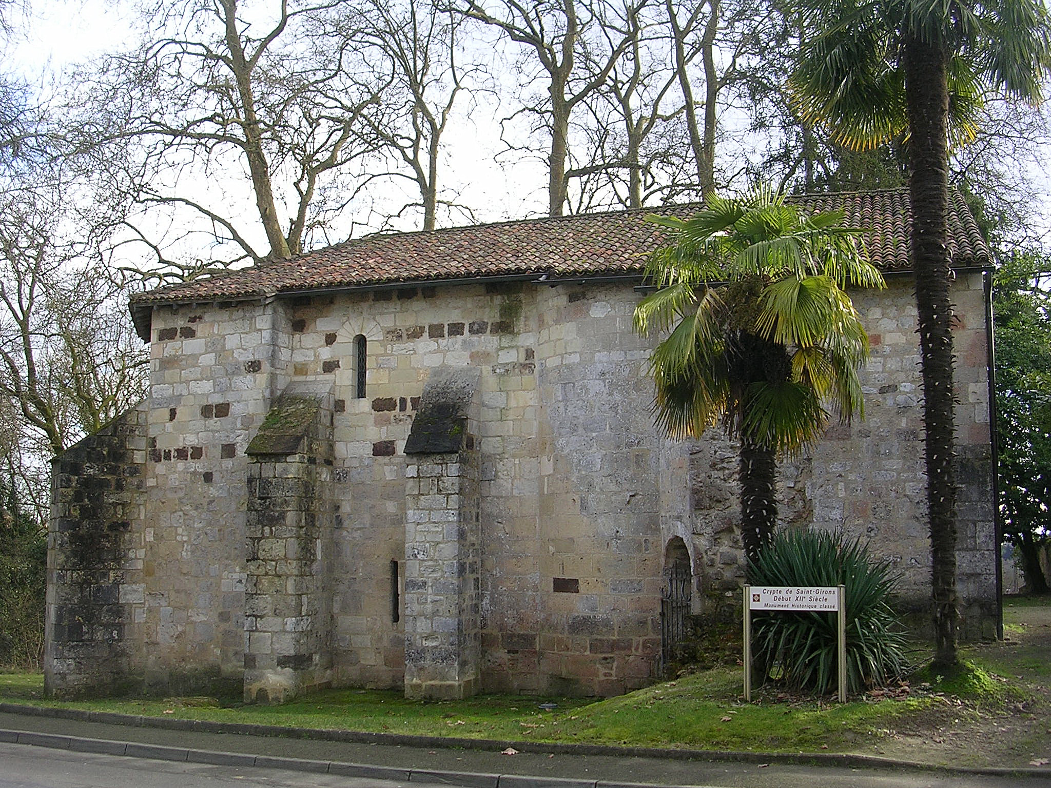 Crypte Saint Girons, à Hagetmau dans le département français des Landes